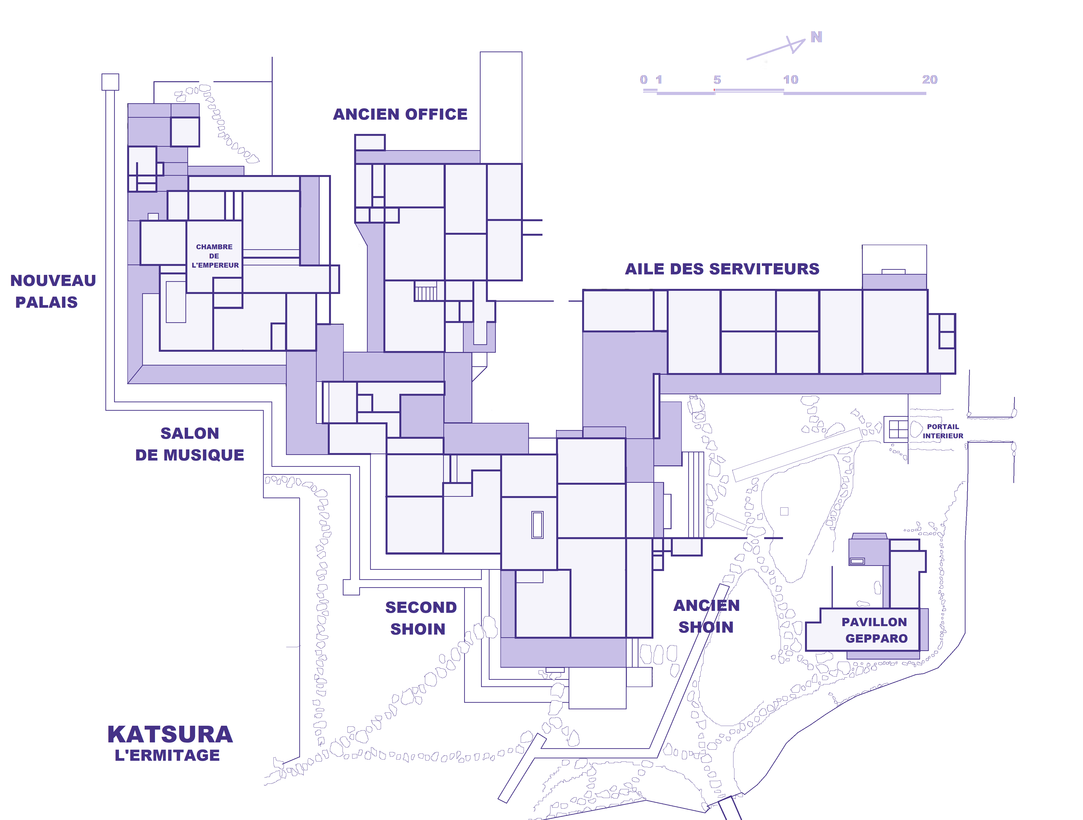 Katsura, plan de l'ermitage